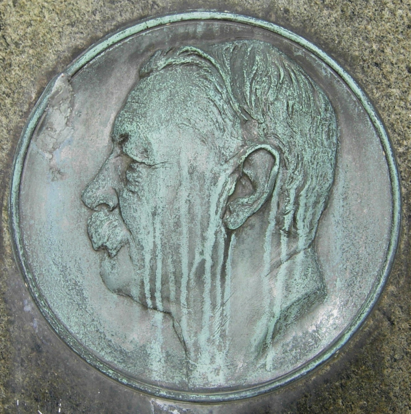 Carl Seffner: Bronze-Medaillon für den Geologen Ferdinand Zirkel (1838 – 1912) auf dem Alten Friedhof Bonn